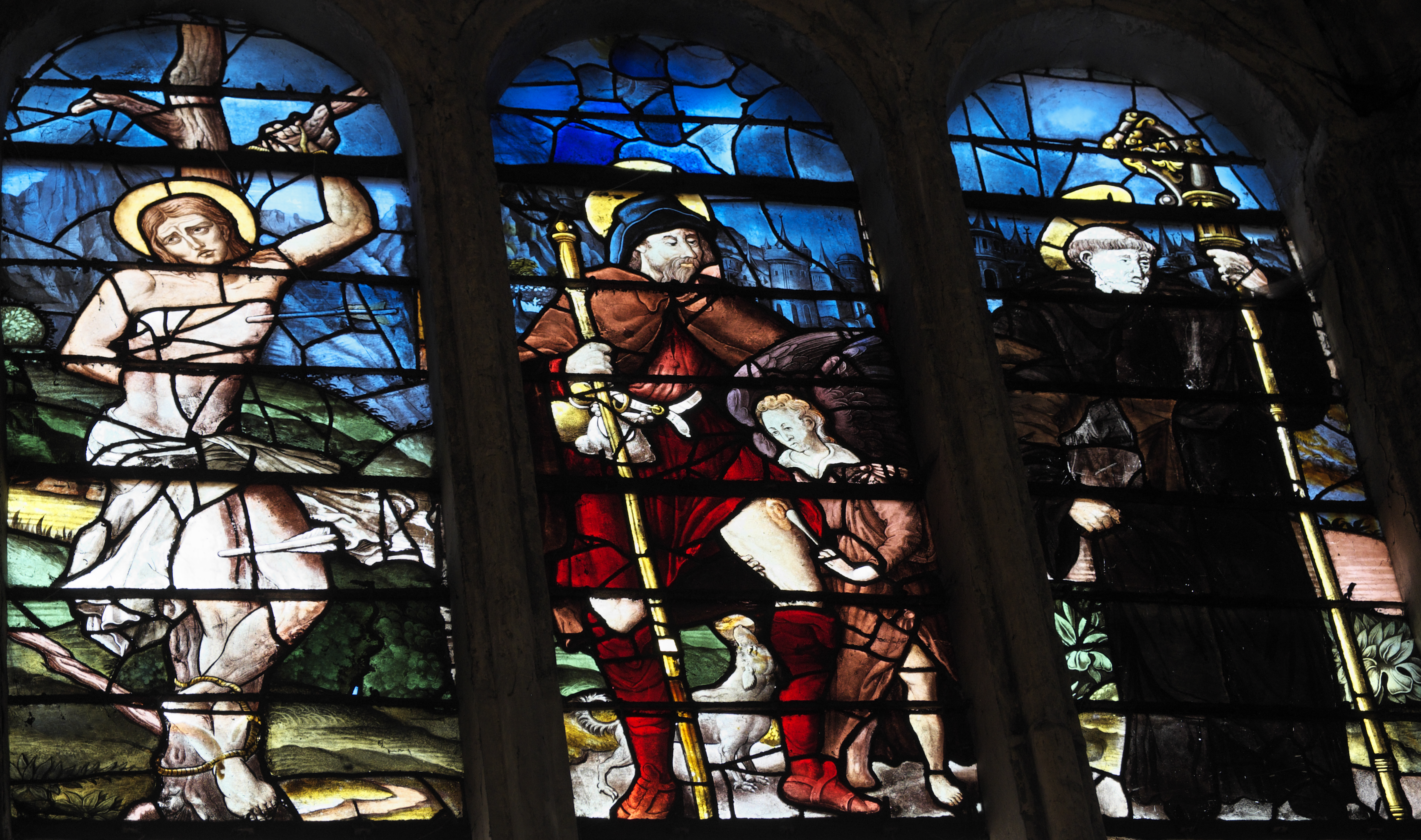 Katholische Pfarrkirche Saint-Pierre in Montfort-l'Amaury im Département Yvelines (Region Île-de-France/Frankreich), Bleiglasfenster (baie 23) aus der Mitte des 16. Jahrhunderts; Darstellung: Heiliger Sebastian, heiliger Rochus, heiliger Gaon (Gond)